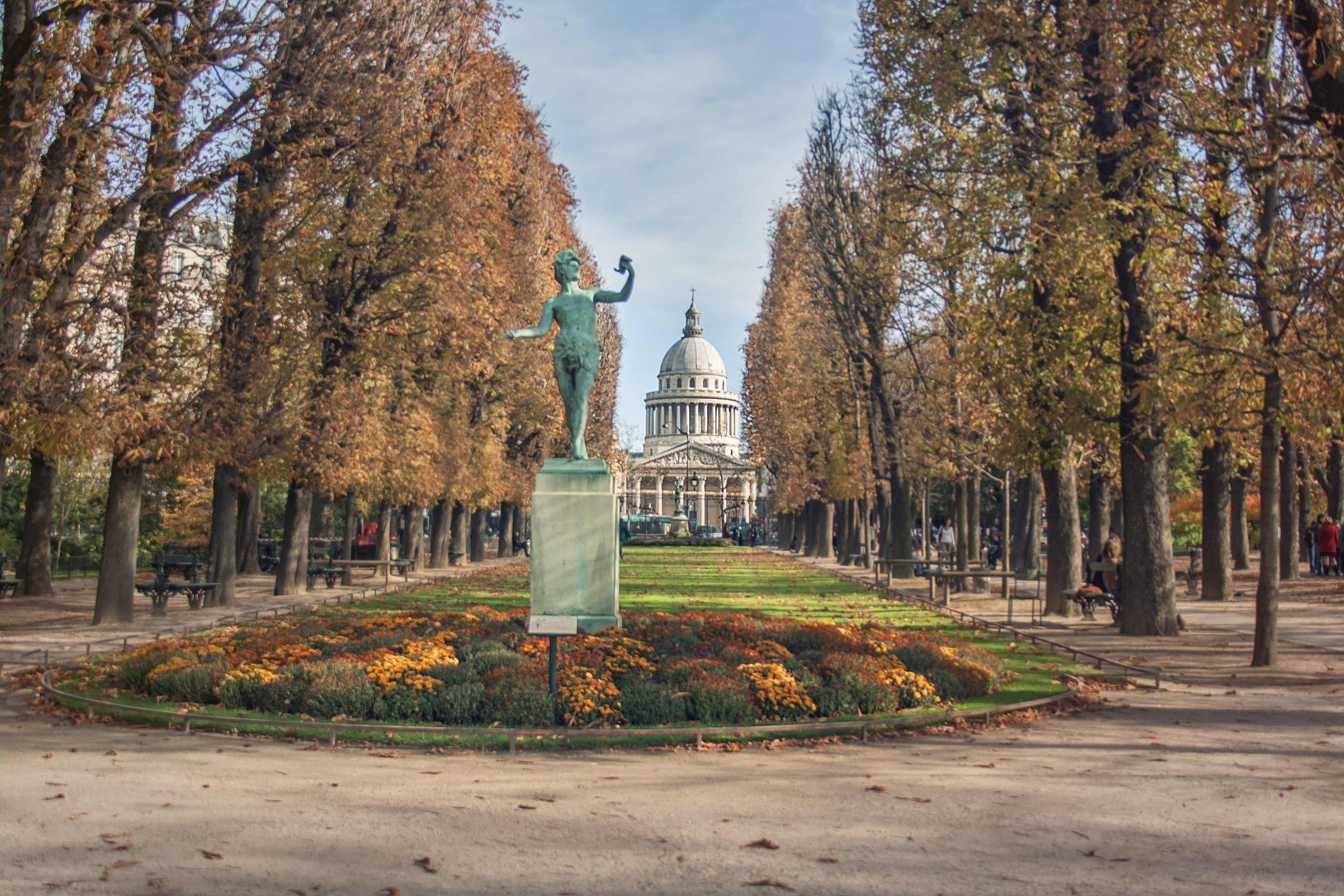 París, Francia